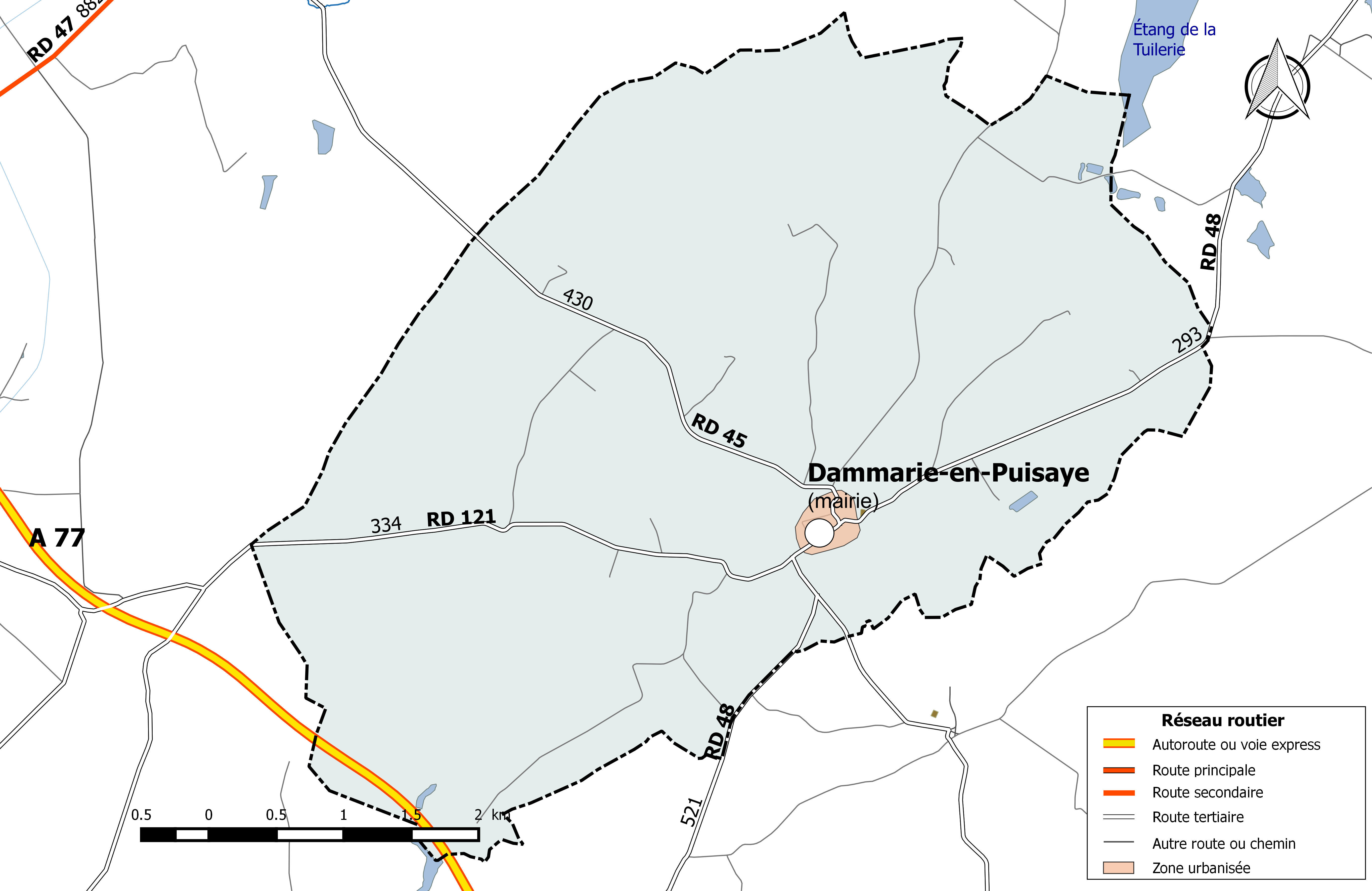 Carte du réseau routier de la commune de Dammarie-en-Puisaye.